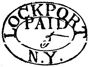 Почтовая марка США, LOCKPORT N.Y. Scott №6X1